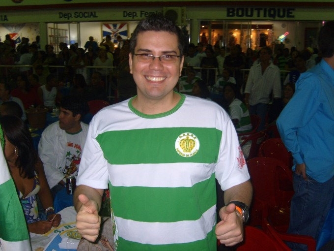 31-05-2009 Carnaval 2010 Sorteio da ordem de desfile da LESGA